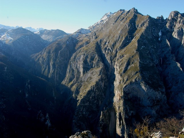 Acceso a Tresviso desde Urdon por la Senda de La Peña © jlgomezlinares